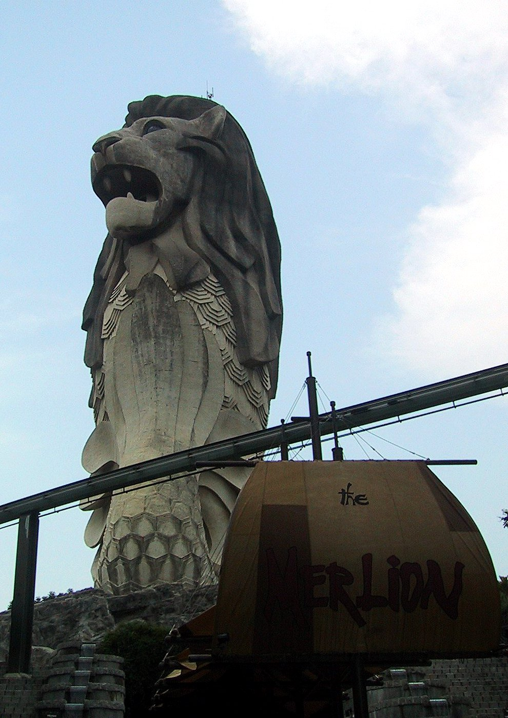 Merlion on Sentosa (Singapore)